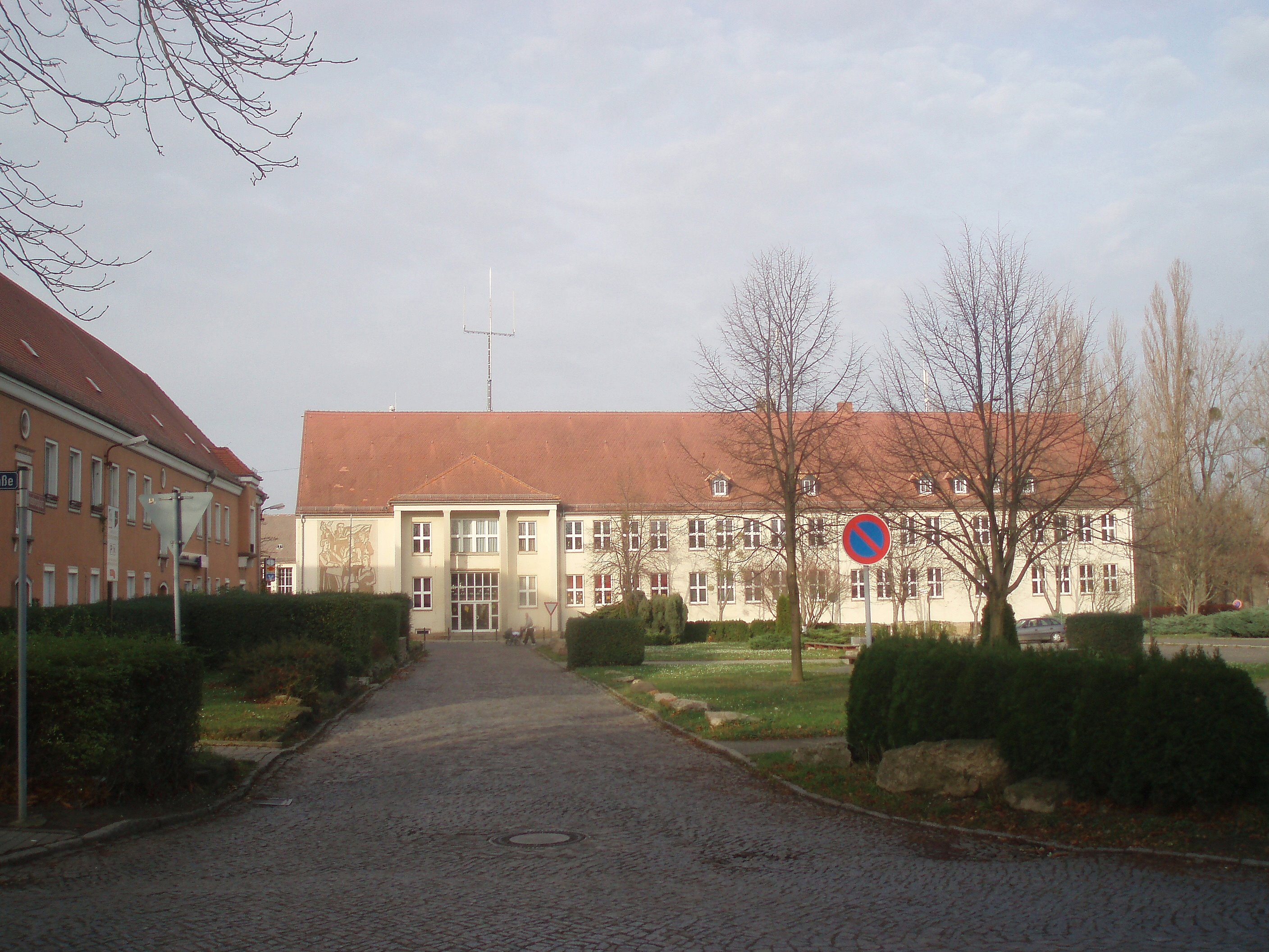 Grundschule der Gemeinde Elsteraue in Tröglitz Urheber: selbst erstellt